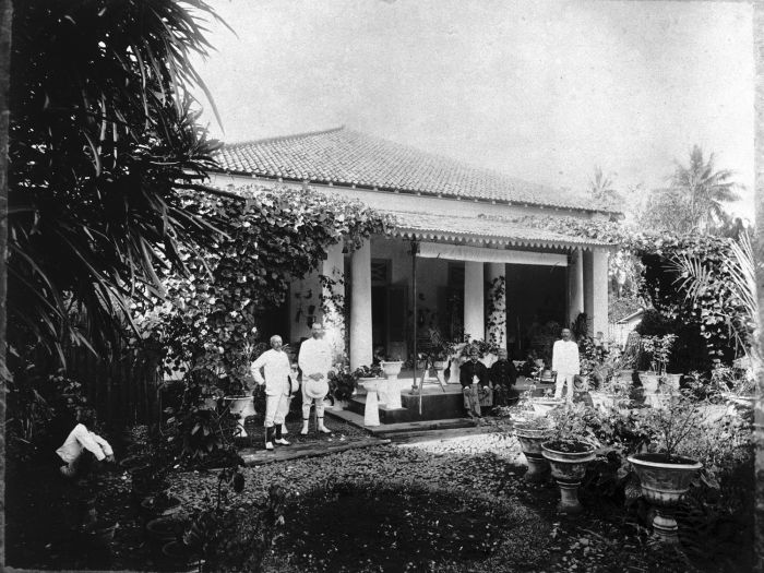 Foto. De woning van de familie van Delden in Adjibarang. In de tuin personeel van de bibittuinen.